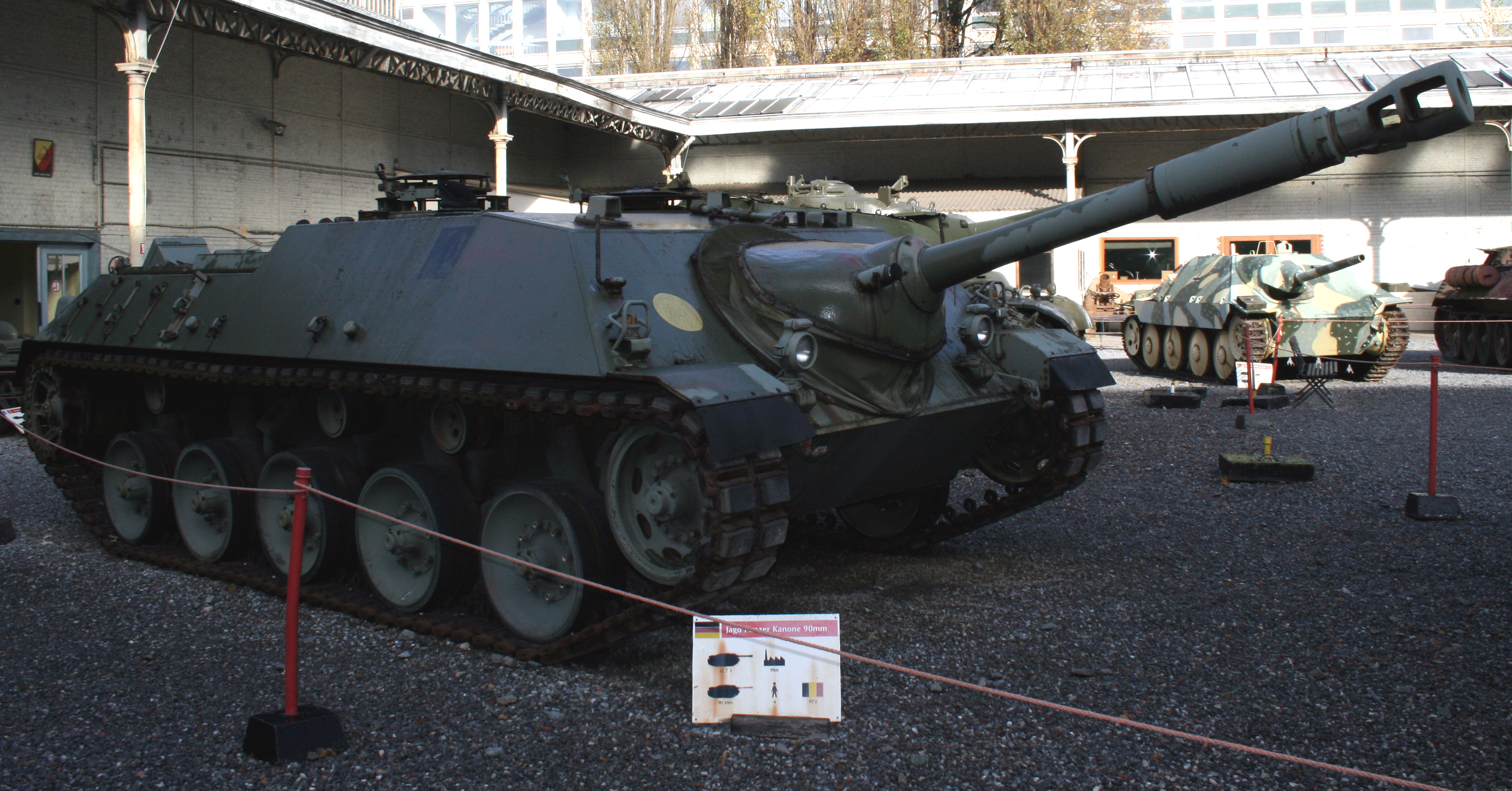 Jagdpanzer Kanone 90 mm "Kanonenjagdpanzer"